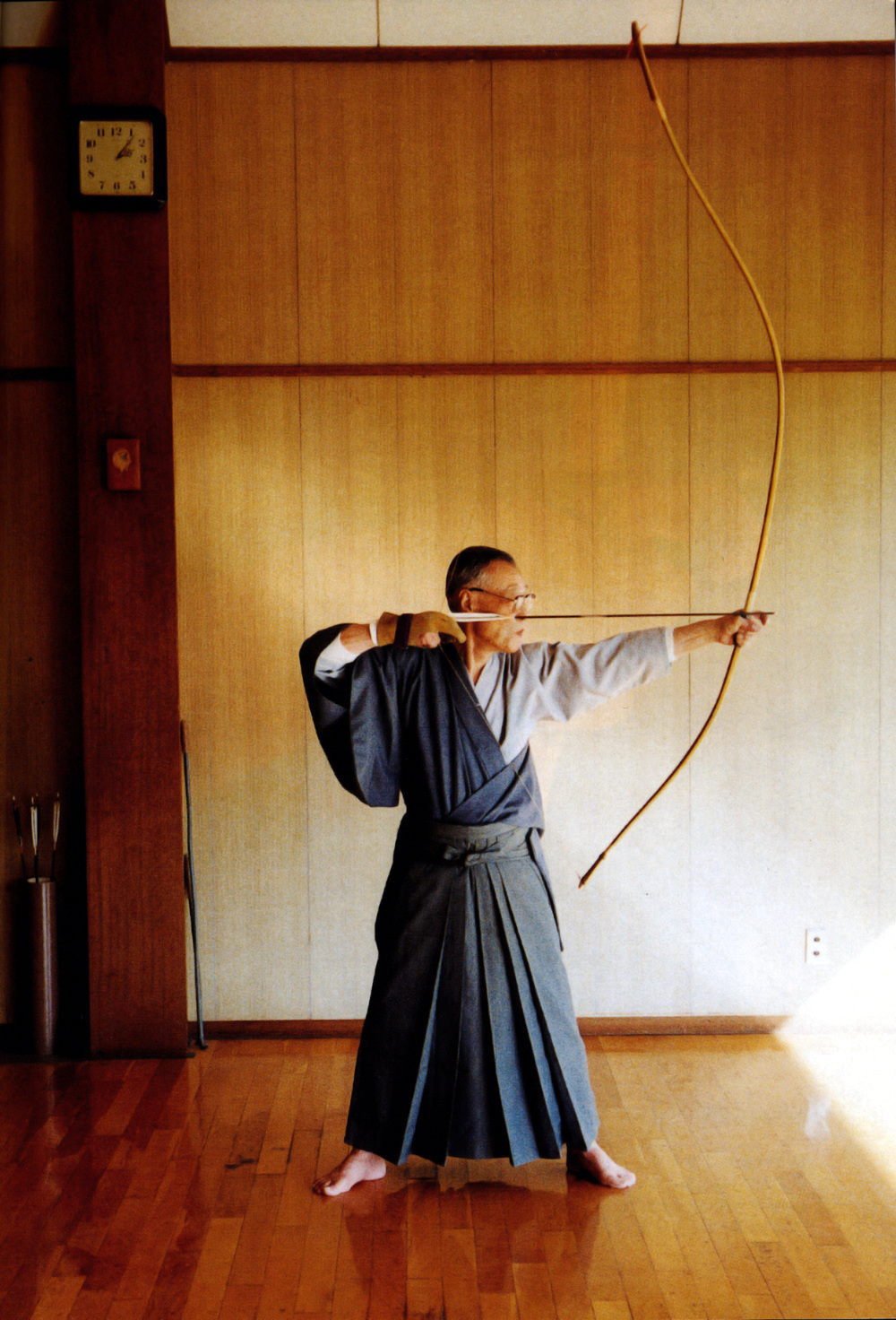 Professor Inagaki Genshiro Yoshimichi 9. Dan Hanshi, 1911-1995 Leiter der Heki Ryū Insai Ha November 1993 im Dōjō der Tsukuba Universität in Japan